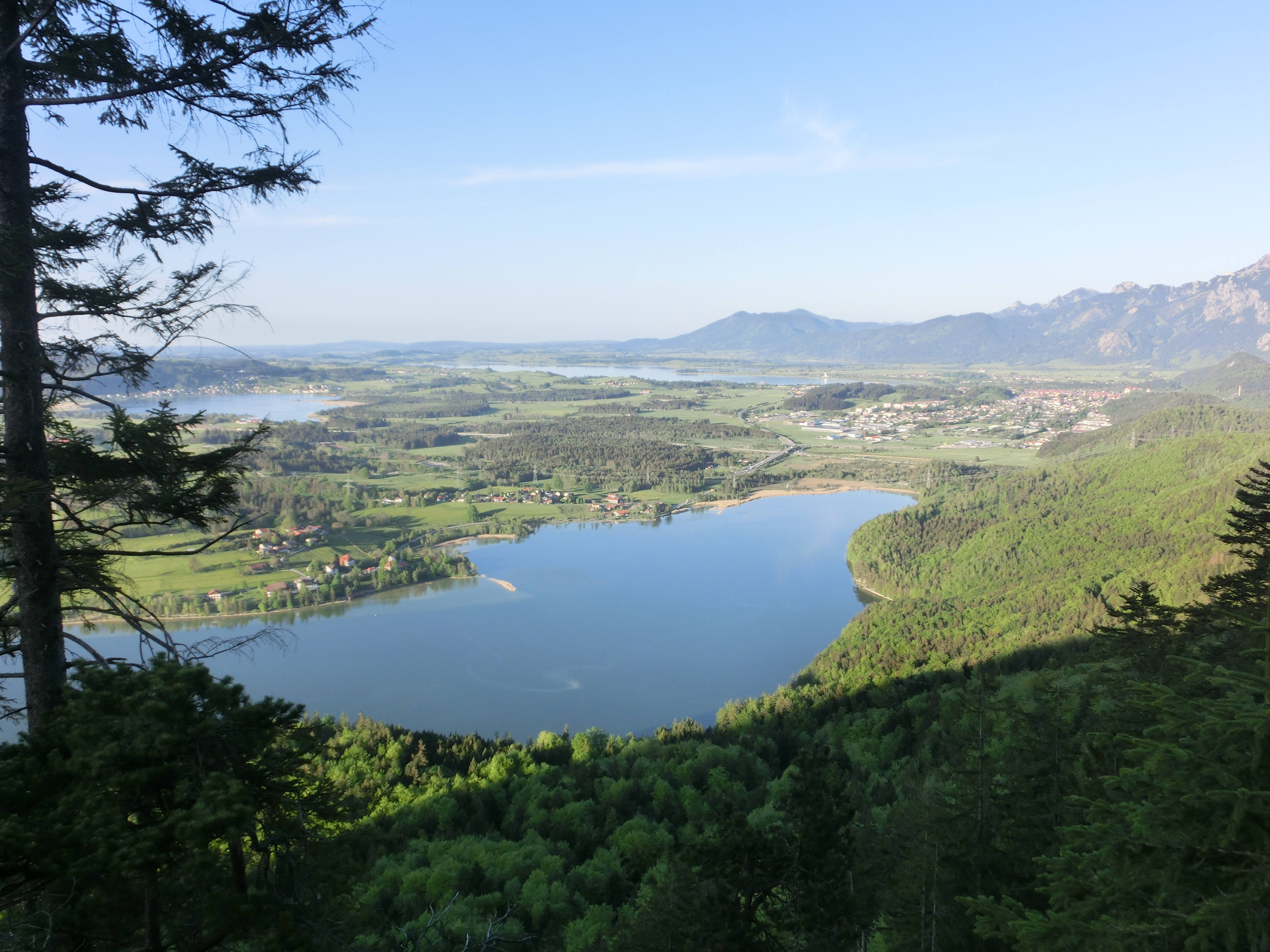 (LSG:BY-LSG-00446.01)_Forggensee und benachbarte Seen